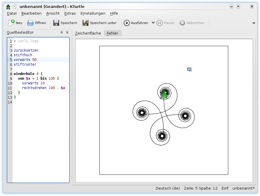 KTurtle. Schleifen malen.